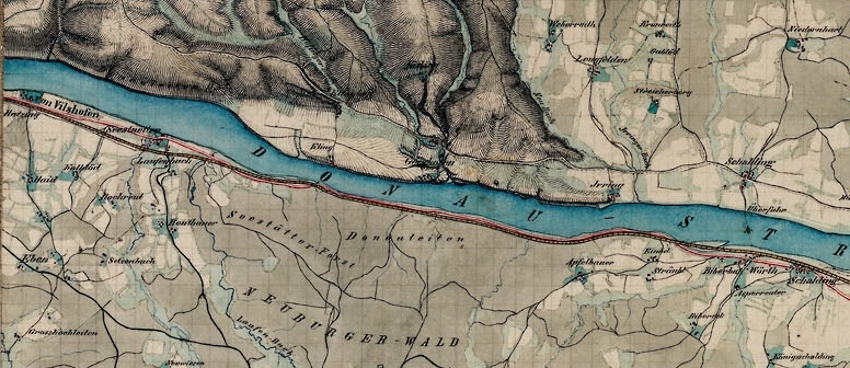 Kartenausschnitt von Blatt 539 "Unterhasselbach", welches die Löwenwand (damals "Donauleiten") zeigt, den nördlichen Steilhang des Neuburger Waldes zur Donau hin